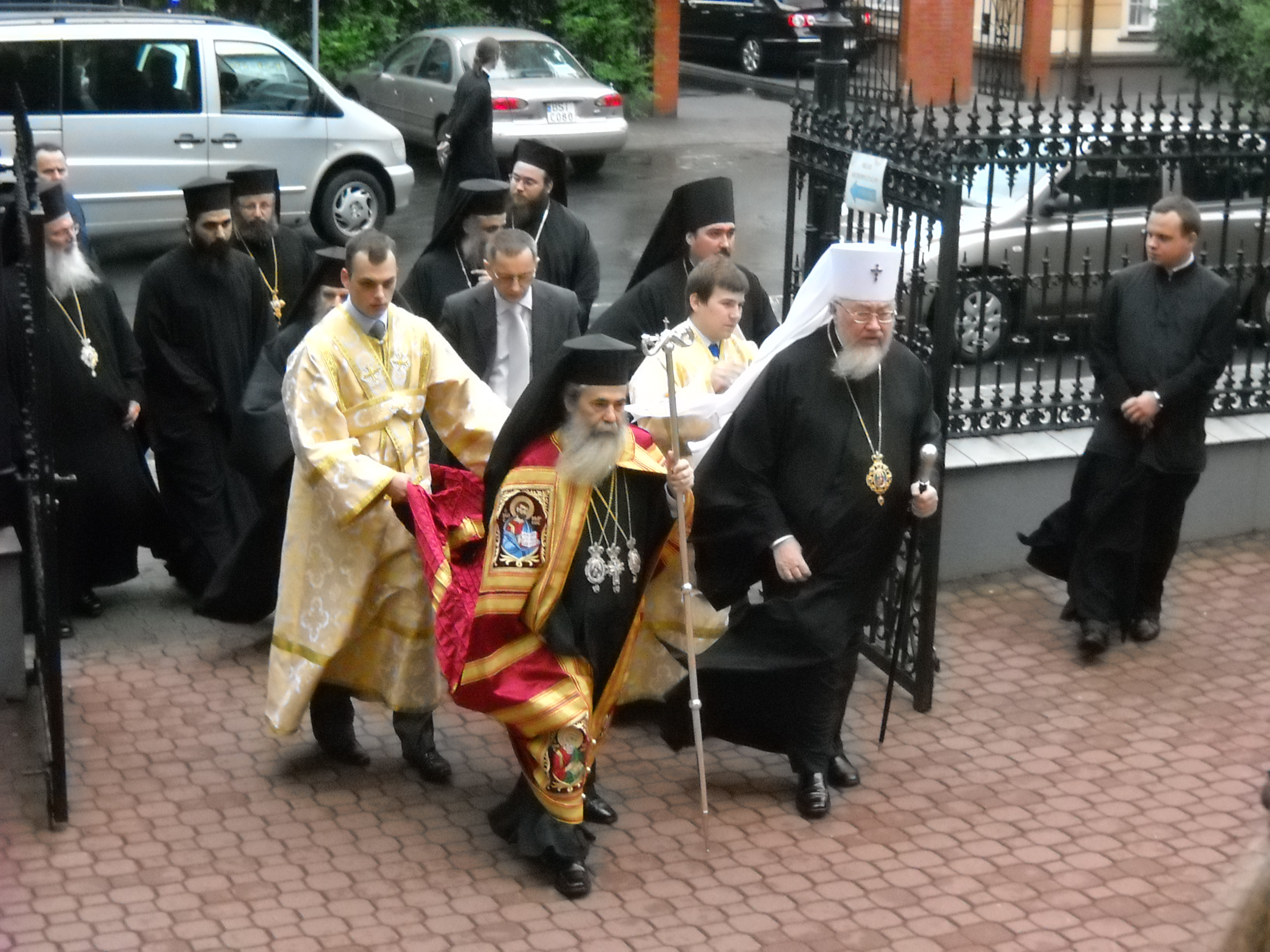 Wizyta patriarchy jerozolimskiego Teofila w Polsce, Warszawa 24 czerwca 2010